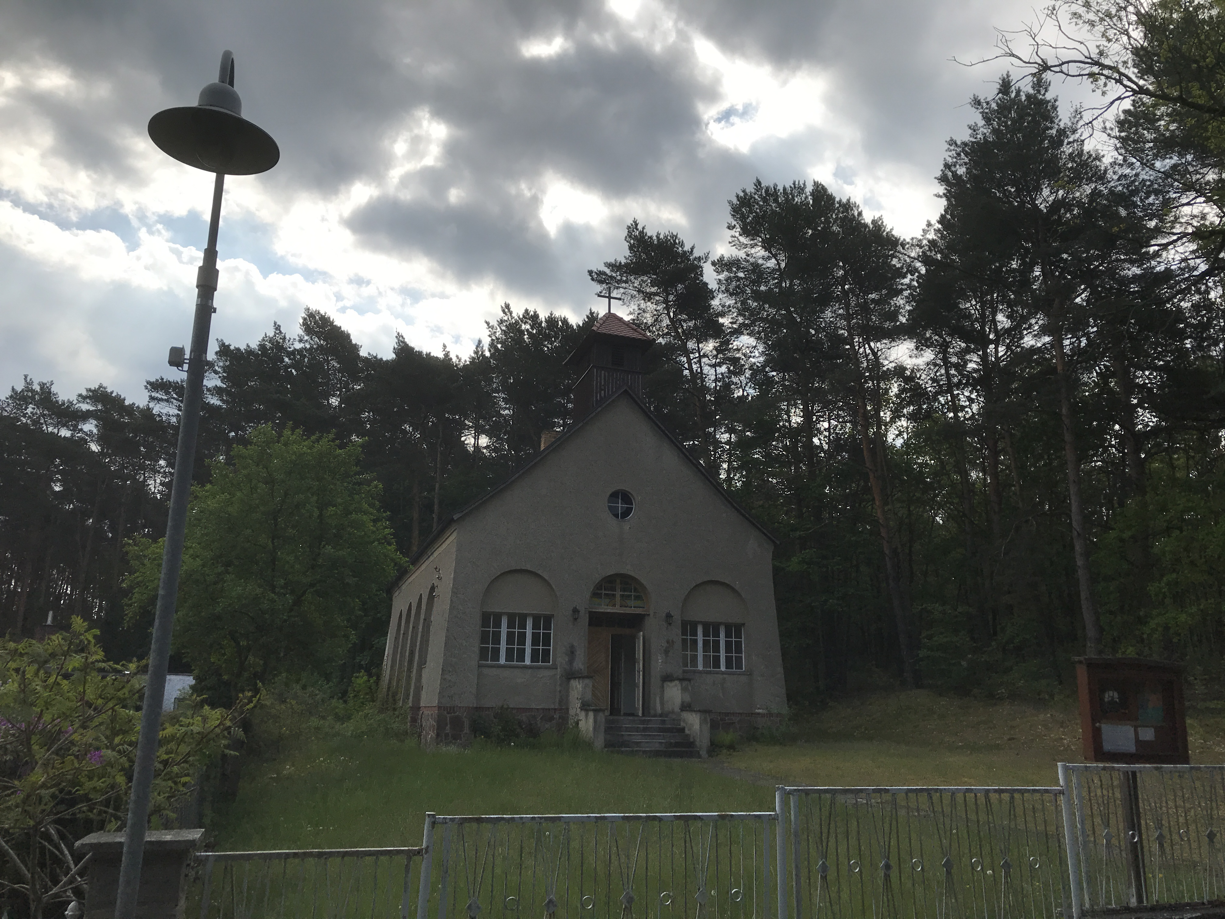 Dorfkirche in Langewahl, Landkreis Oder-Spree in Brandenburg